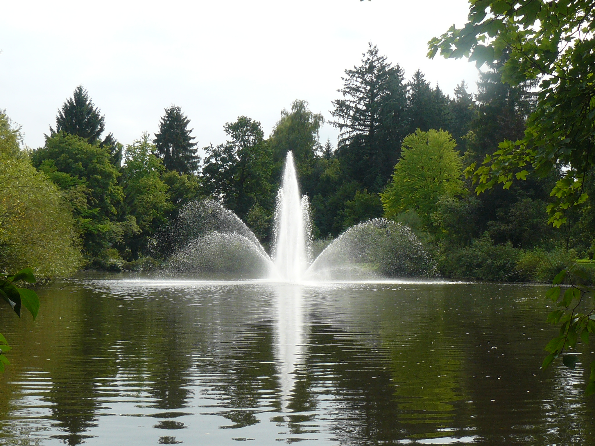 D7-78-116-1 Kurpark Springbrunnen, Bad WoerishofenThis is a photograph of an architectural monument.